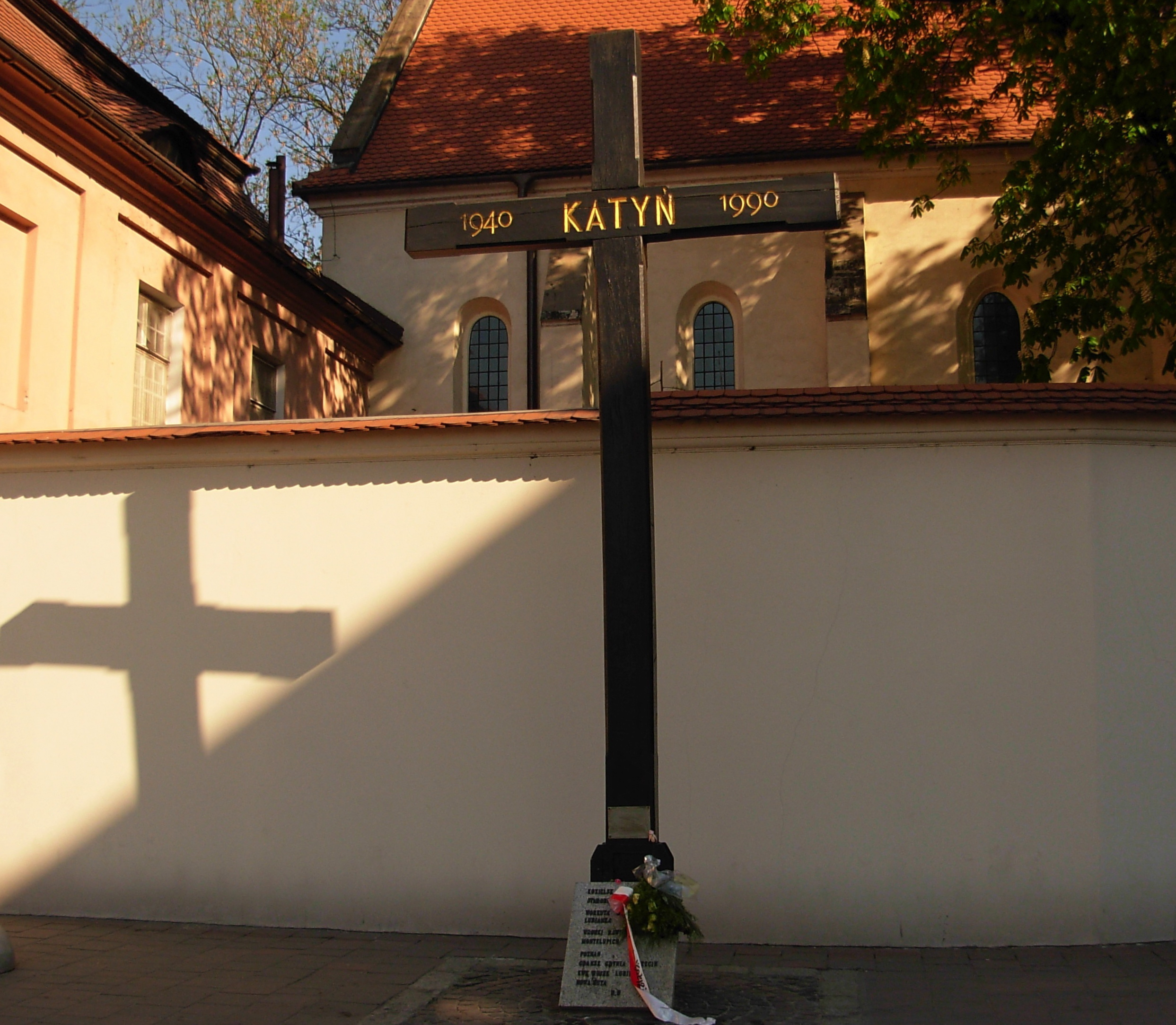 Katyn memorial in Krakow